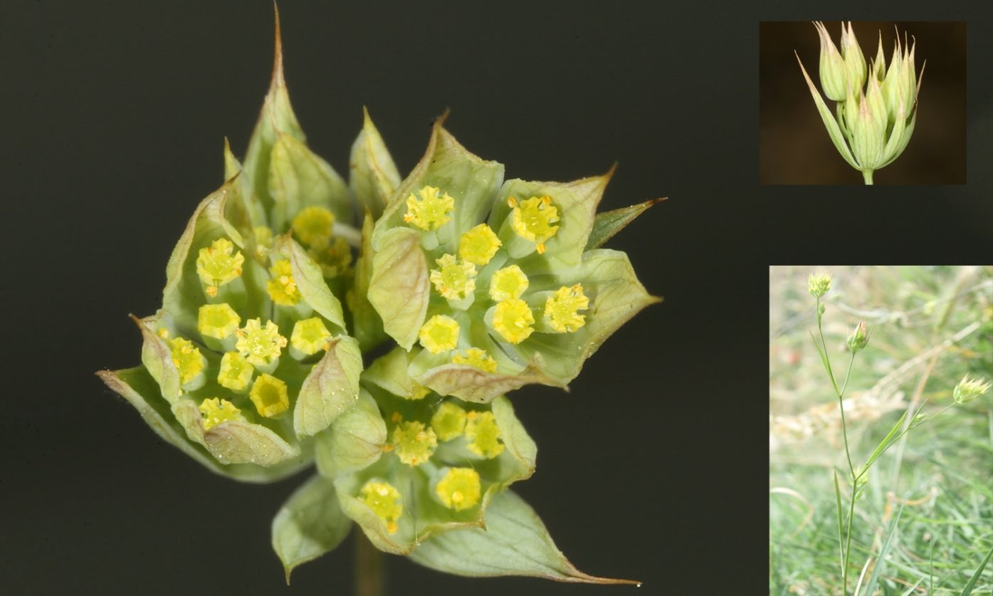 Bupleurum baldense Turra in Giorn. Italia Sci. Nat. 1: 120 (1764)